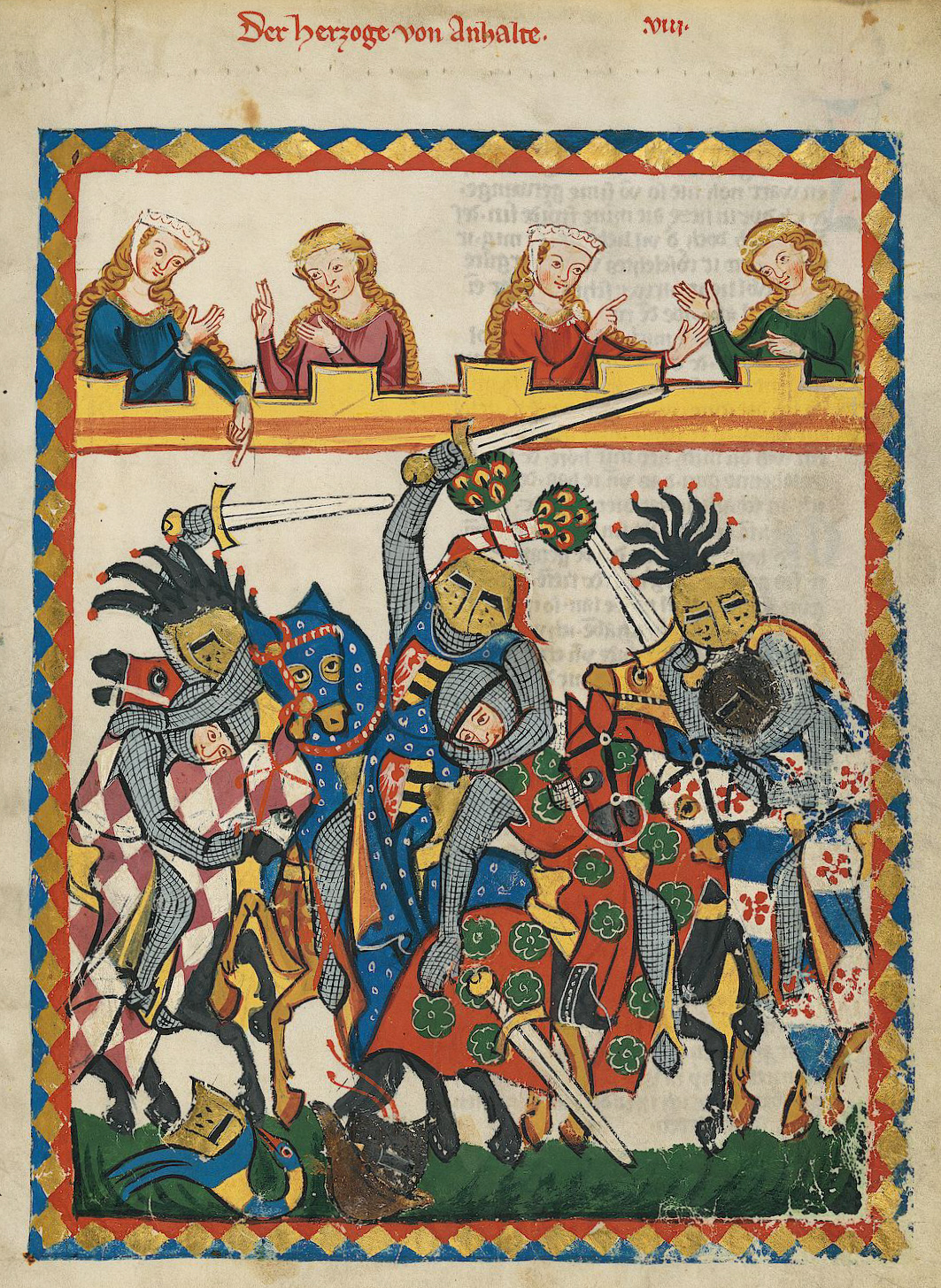 Codex Manesse, UB Heidelberg, Cod. Pal. germ. 848, fol. 17r, "Herzog von Anhalt"